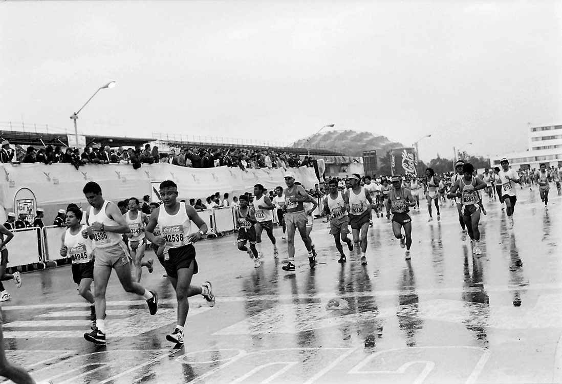 Fotografía antigua de la Ciudad de México resguardadas por el Museo Archivo de la Fotografía (MAF) de la Ciudad de México.